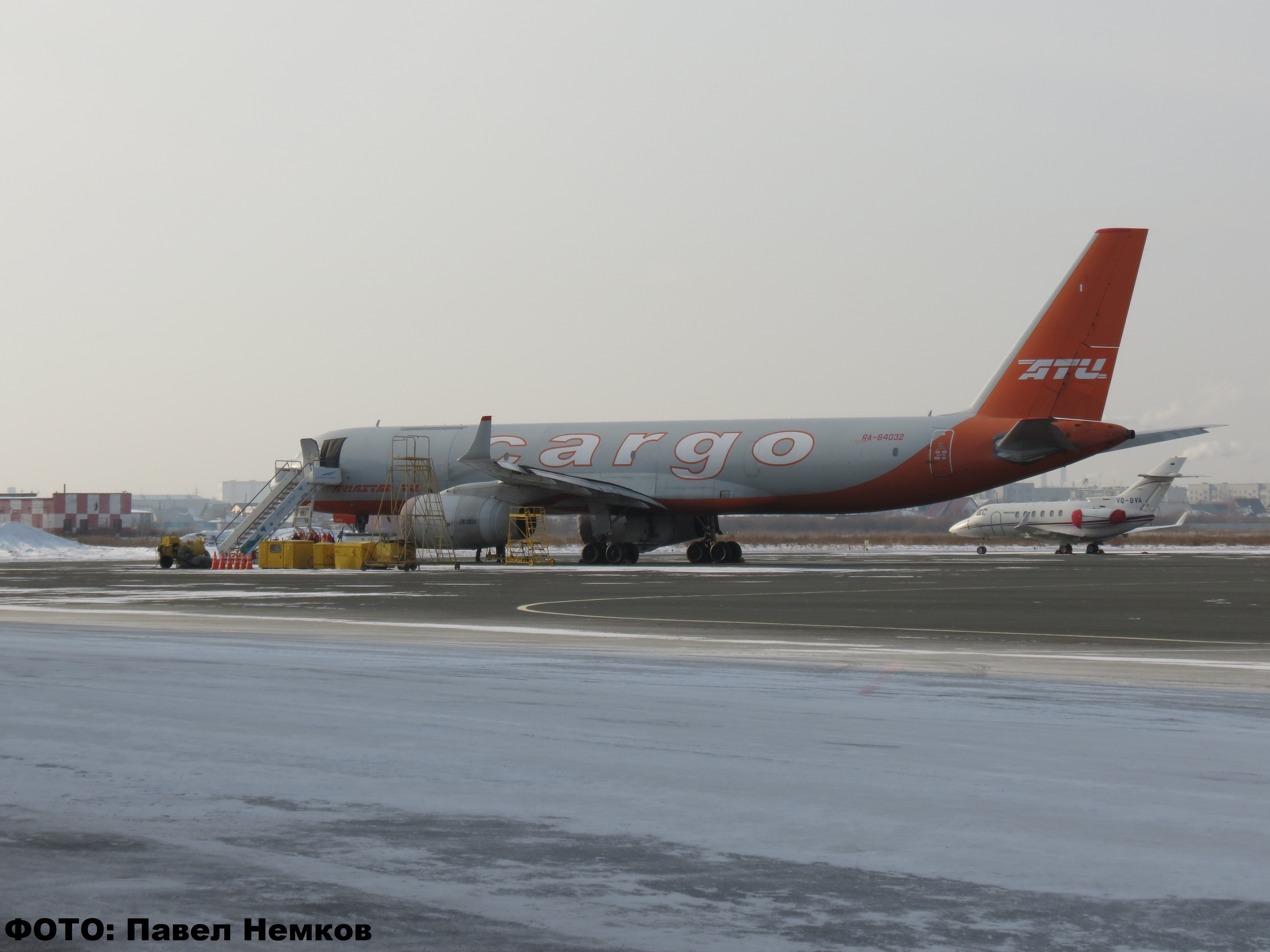 Самолёт ТУ-204 с бортовым - RA-64032 прибыл в Курган в рамках планируемого в области транспортно-логистического центра.